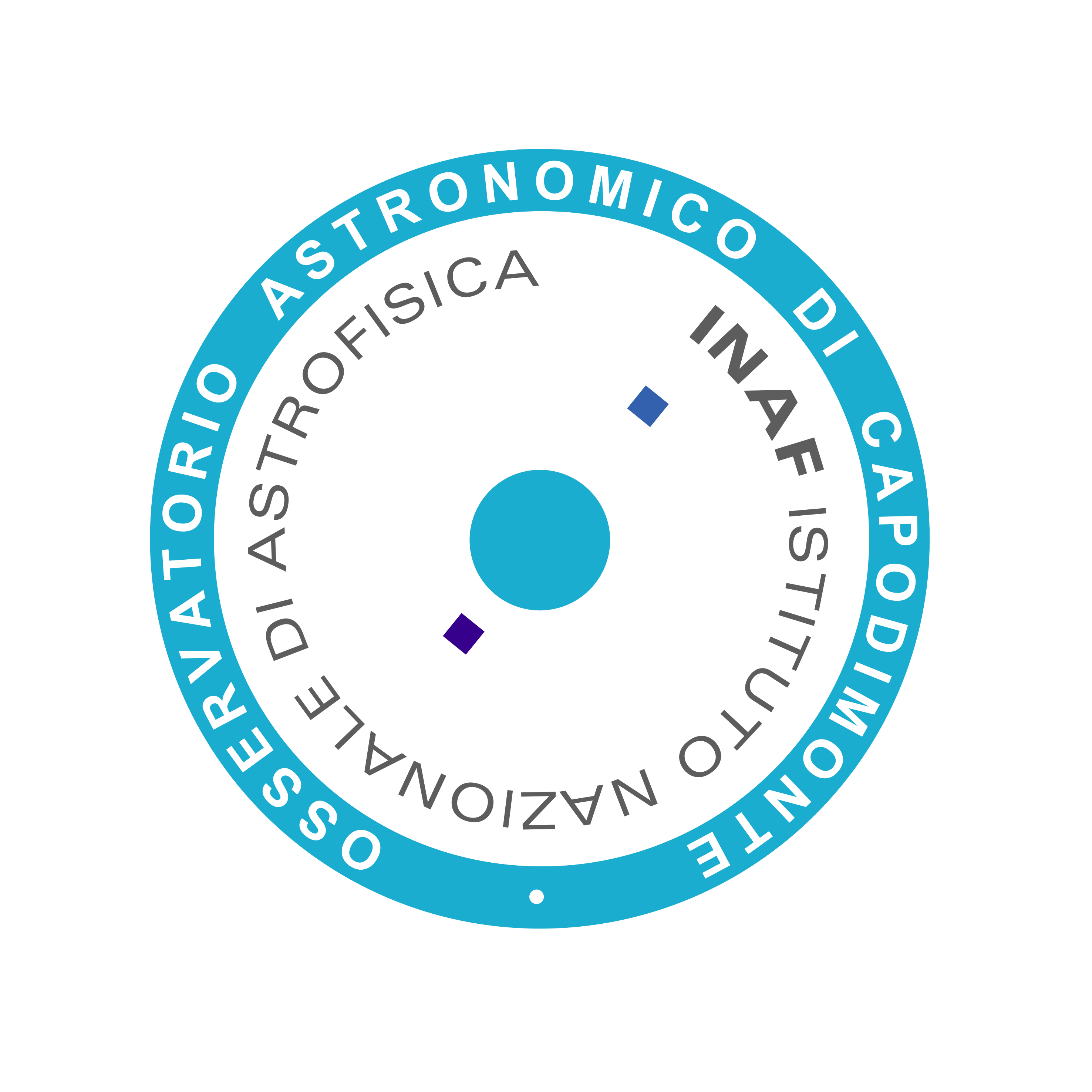 Logo circolare dell'INAF-Osservatorio Astronomico di Capodimonte